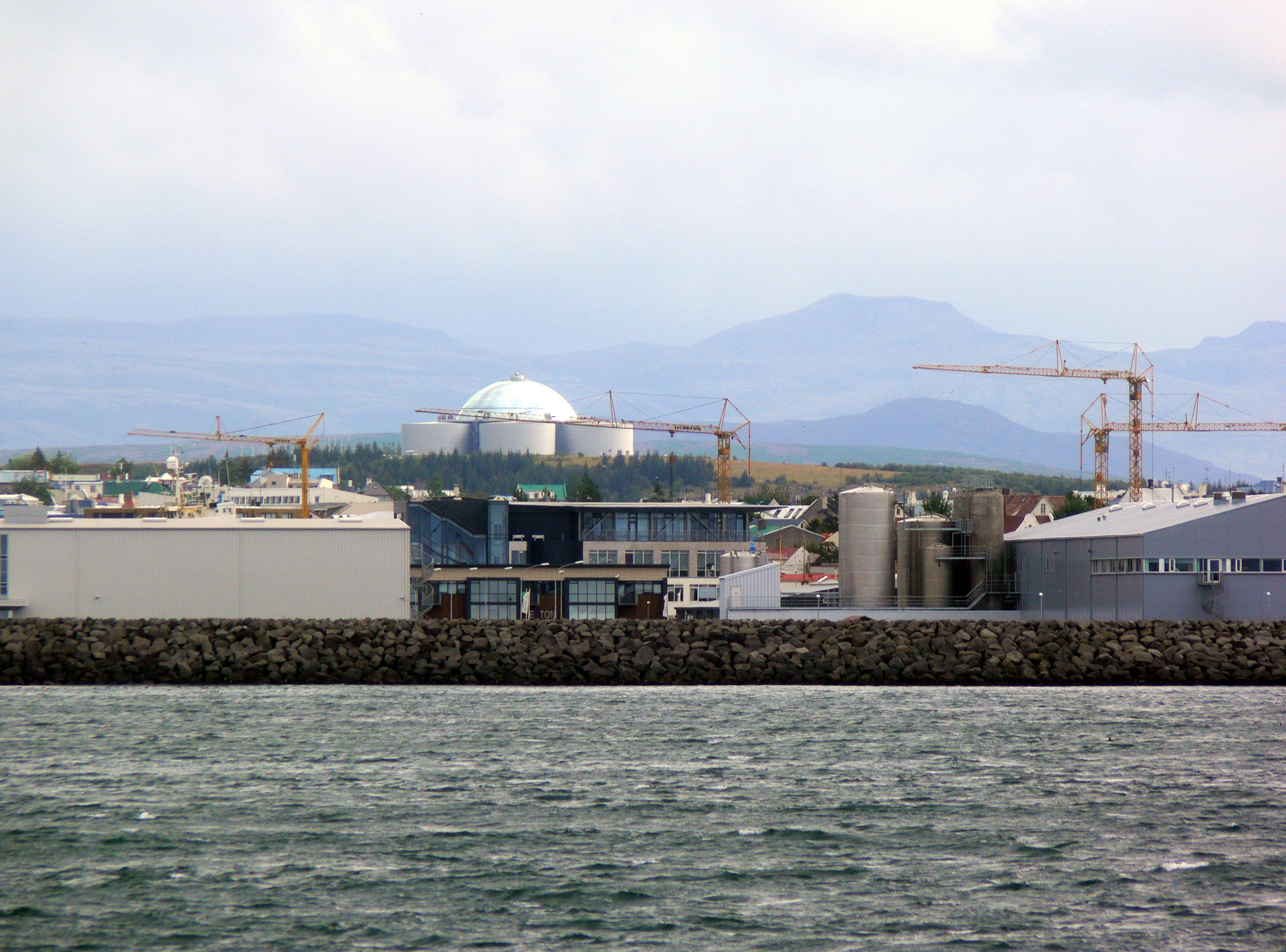 Perlan vom Meer aus.